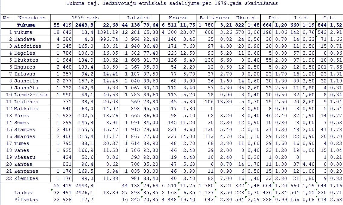 Latvijas 1979. gada tautas skaitīšanas dati